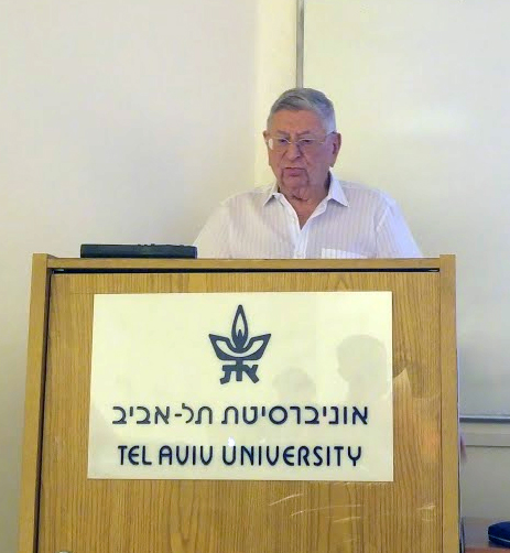 פרופסור צבי לרון, בעת הרצאות בפני סטודנטים לרפואה באוניברסיטת תל אביב 2017